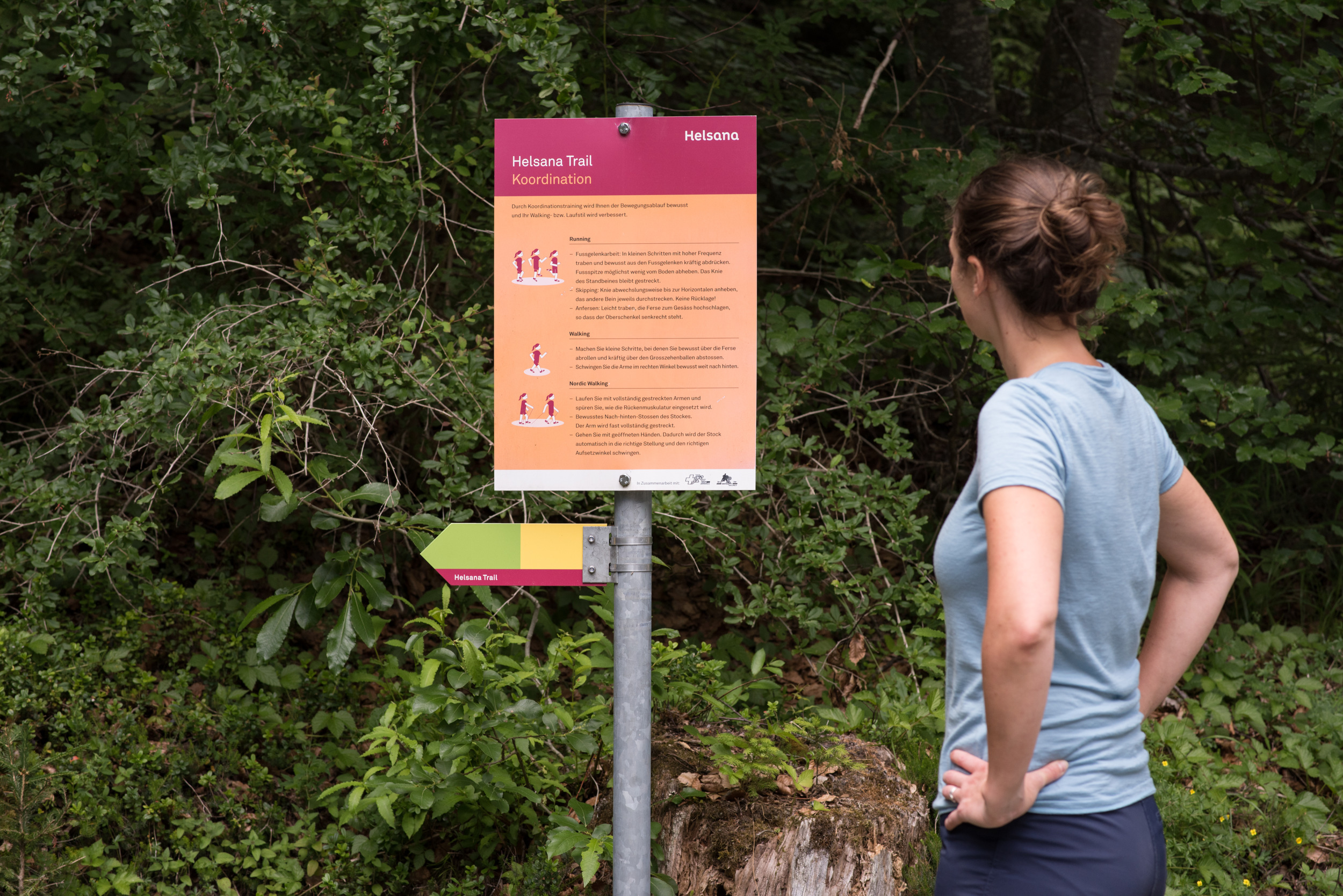 Helsana Trail Flims Trainingsschild (Koordination) und Wegweiser mit Frau, die das Schild anschaut